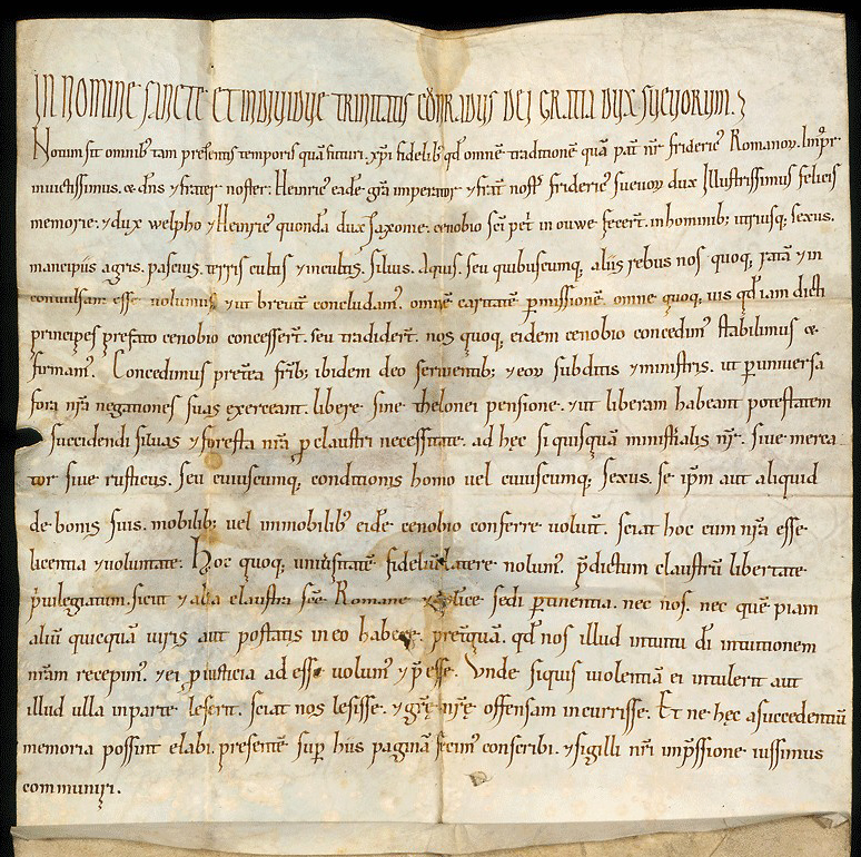 Urkunde Herzog Konrads von Schwaben für das Kloster Weißenau, undatiert (ca. 1192-1196); Hauptstaatsarchiv Stuttgart B 523 U 4 (Siegel wg. Urheberrechtsproblematik entfernt)